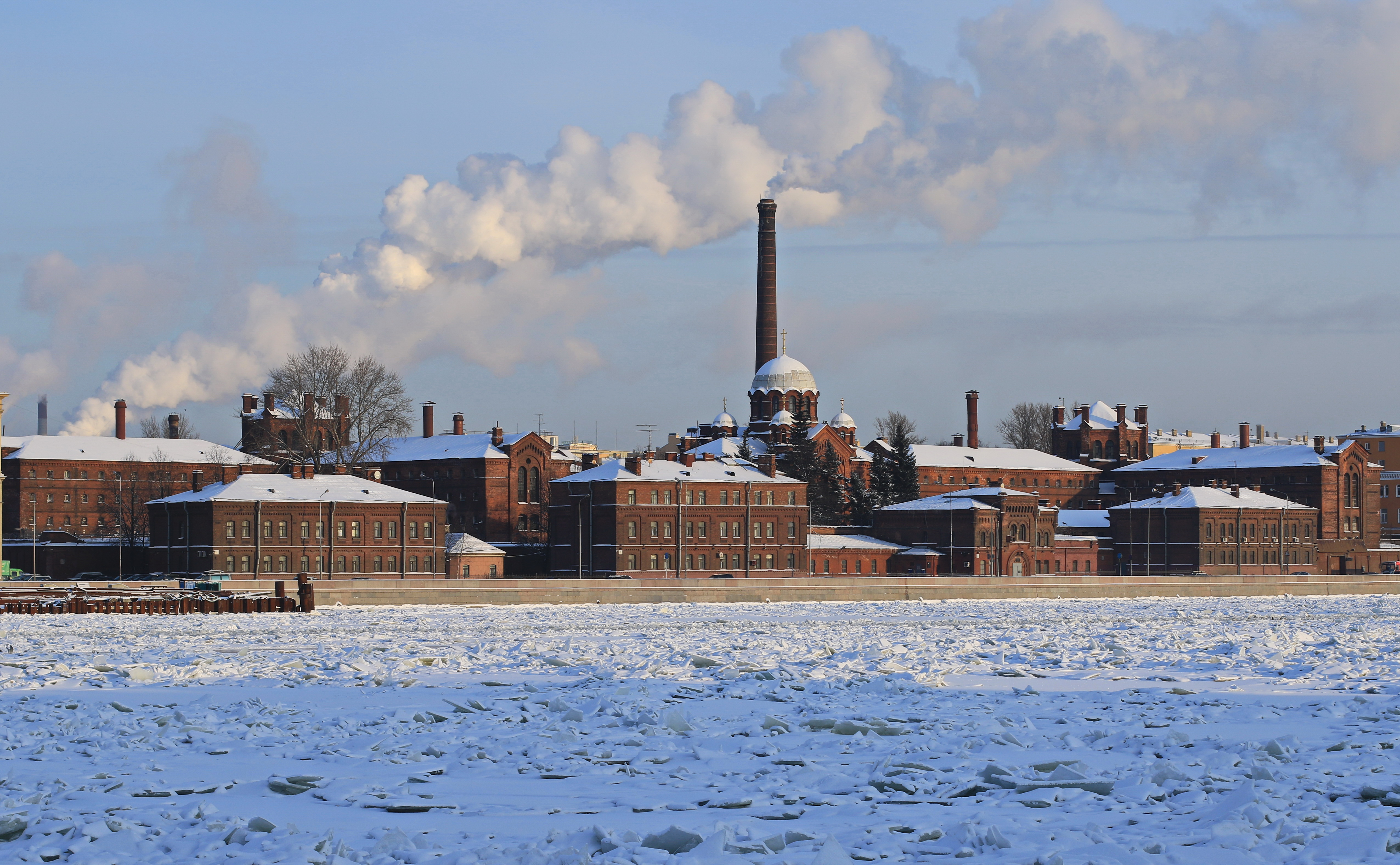 Kresty-Gefängnis in St. Petersburg am Ufer der Newa. Russland.